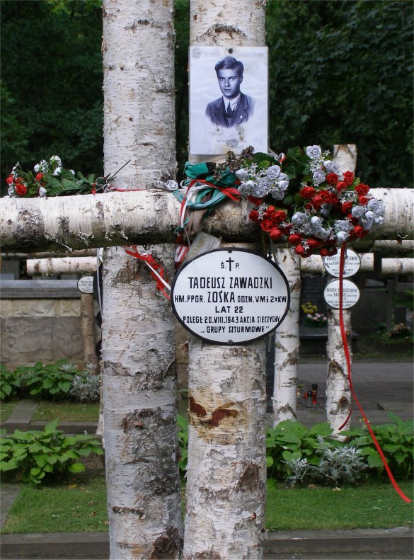 Krzyż nad grobem Tadeusza Zawadzkiego, Powązki wojskowe w Warszawie (fot Zu)